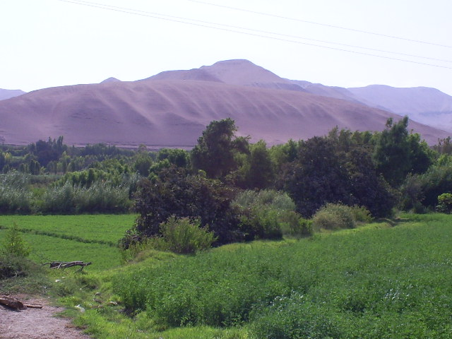 Imagen del Valle de Moquegua, en Perú